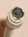 PS/2 stekker - foto zelf genomen en valt onder de GFDL